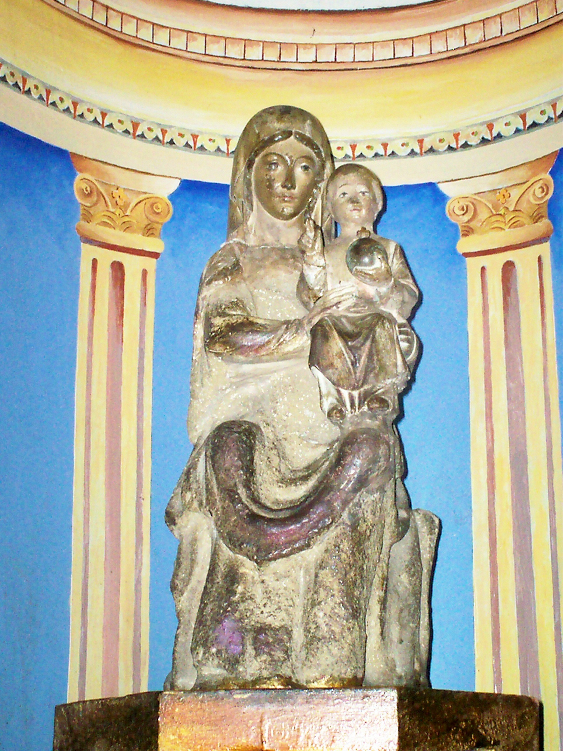 La Verge de Sarrança